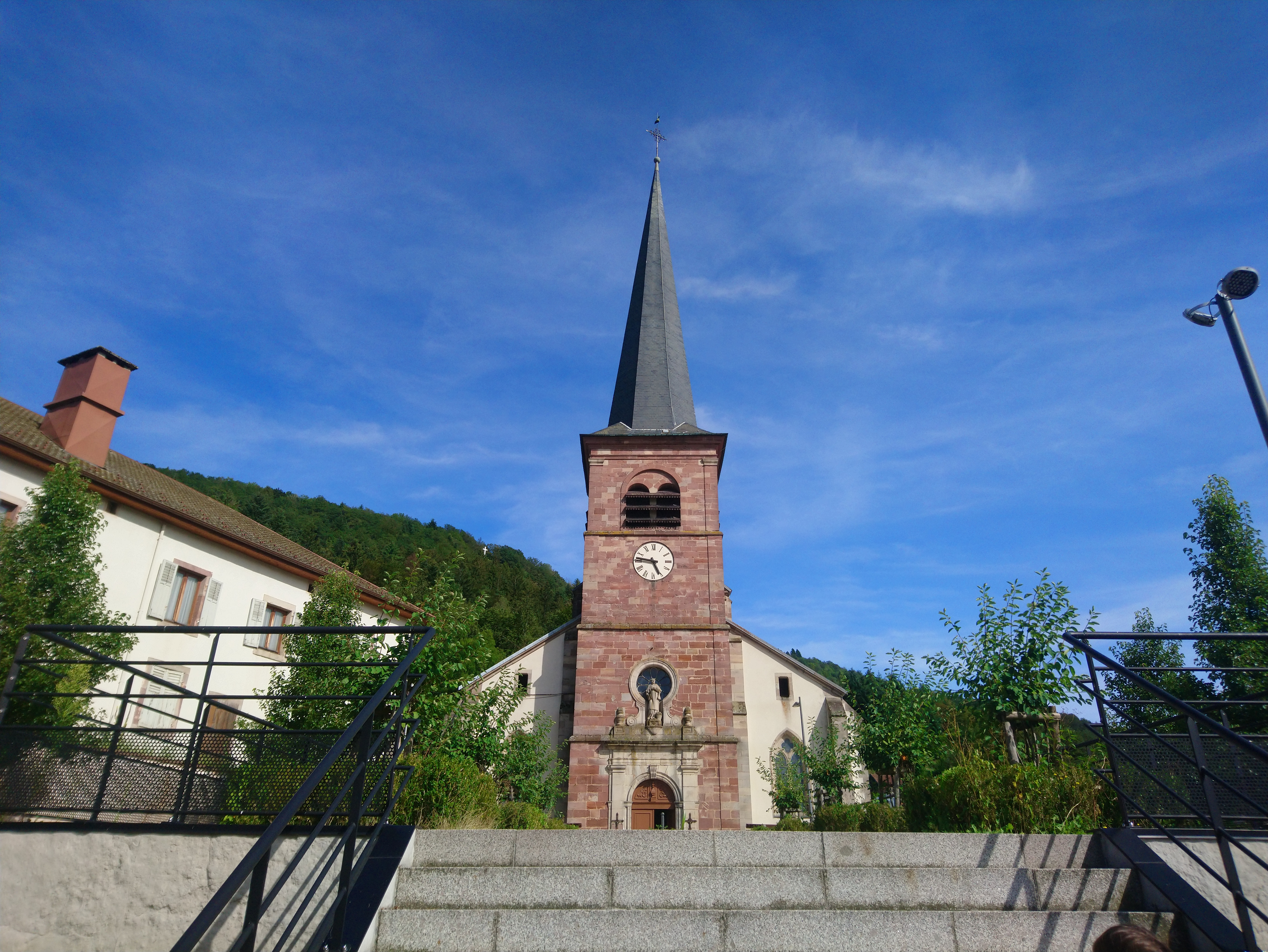 L'église Saint-Étienne de Rupt-sur-Moselle